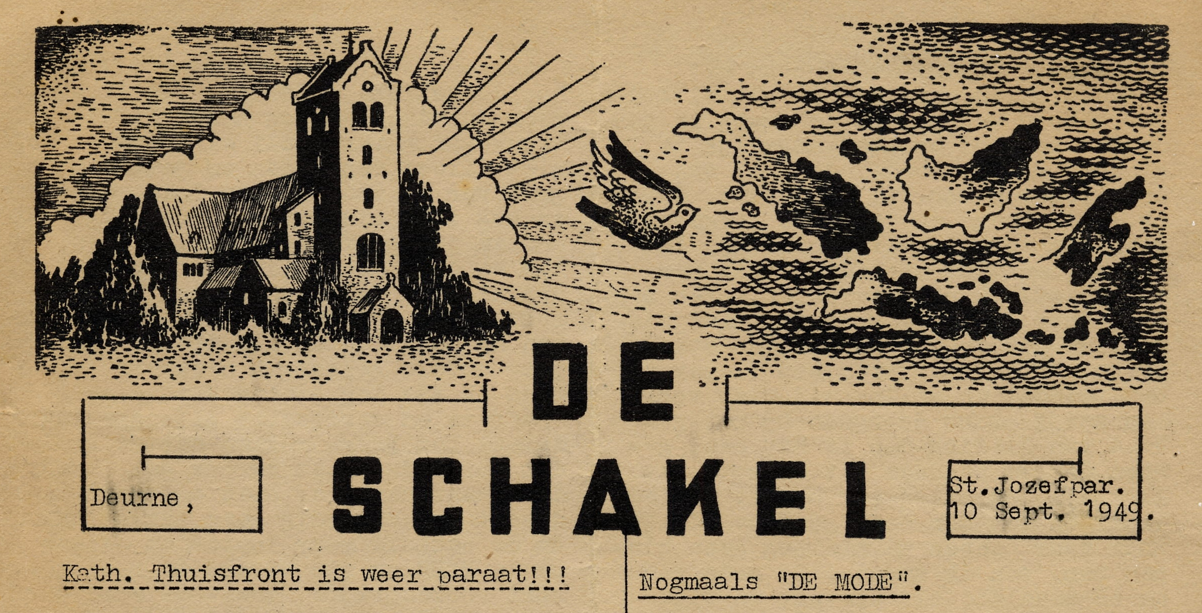 Voorpagina De Schakel, blad van Katholiek Thuisfront Sint Jozefparochie 10 september 1949. Beschikbaar gesteld door coll. mw. Matheij-Fransen